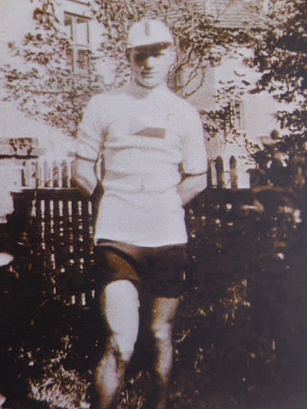 Miloslav Loos (1914-2010), československý cyklista